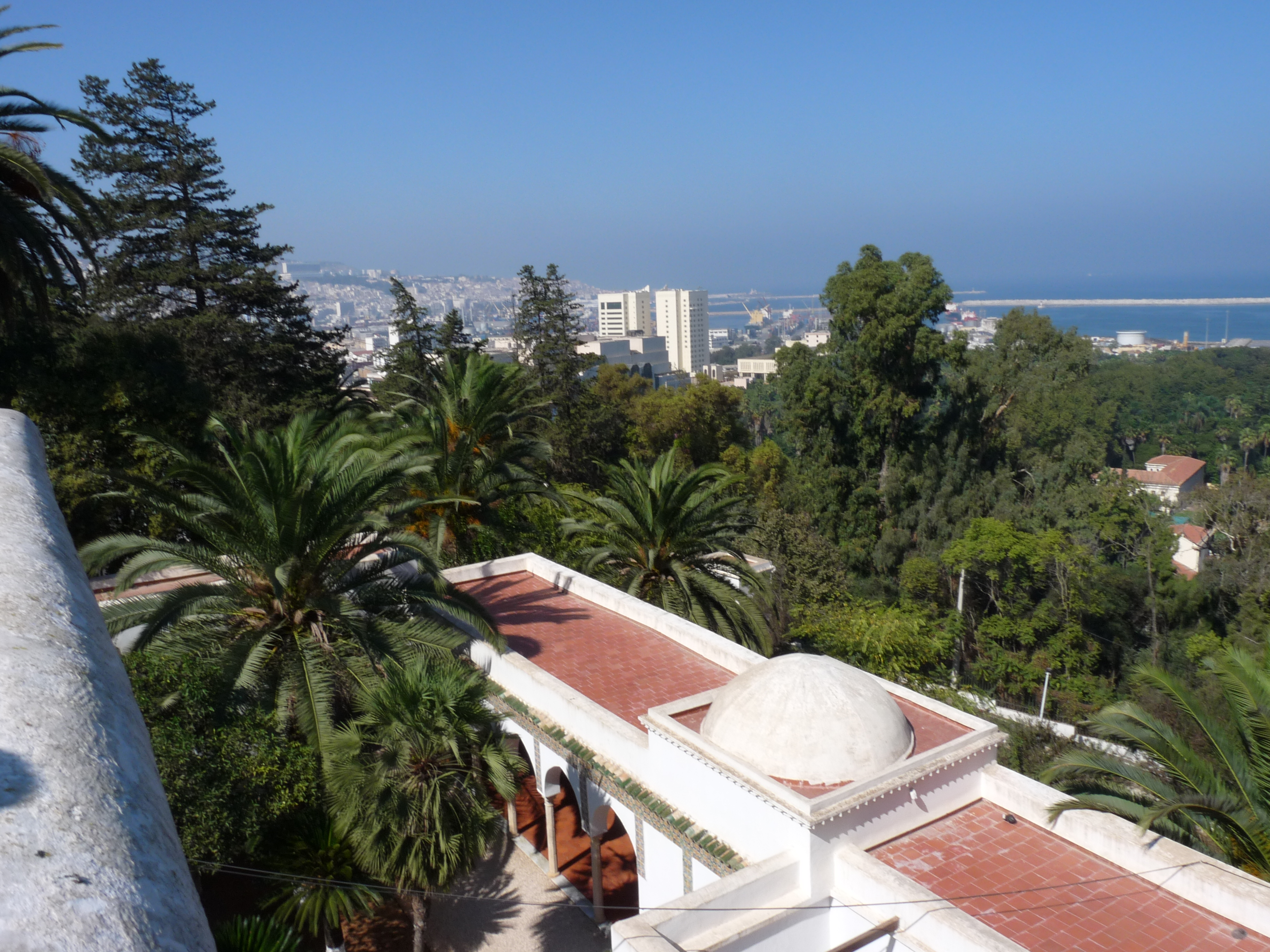 Jardins d'Alger - Algiers Gardens